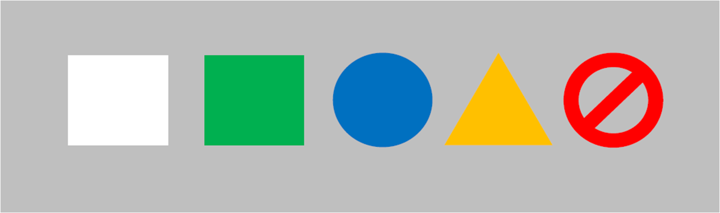 Některé komunikační systémy se pokoušejí fungovat s odchylkami.